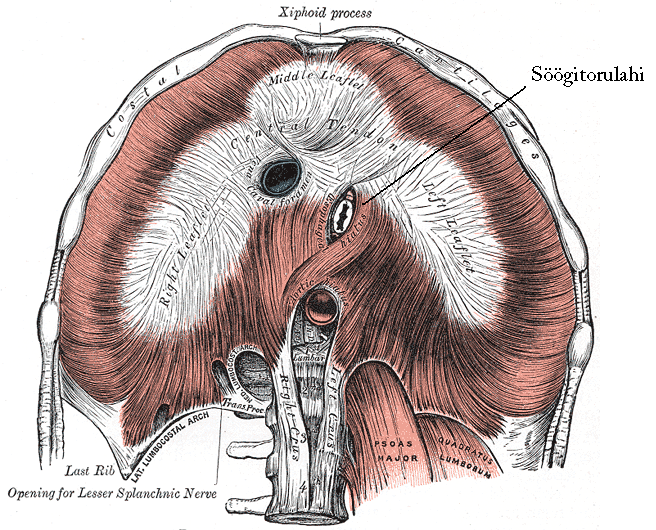 Söögitorulahi